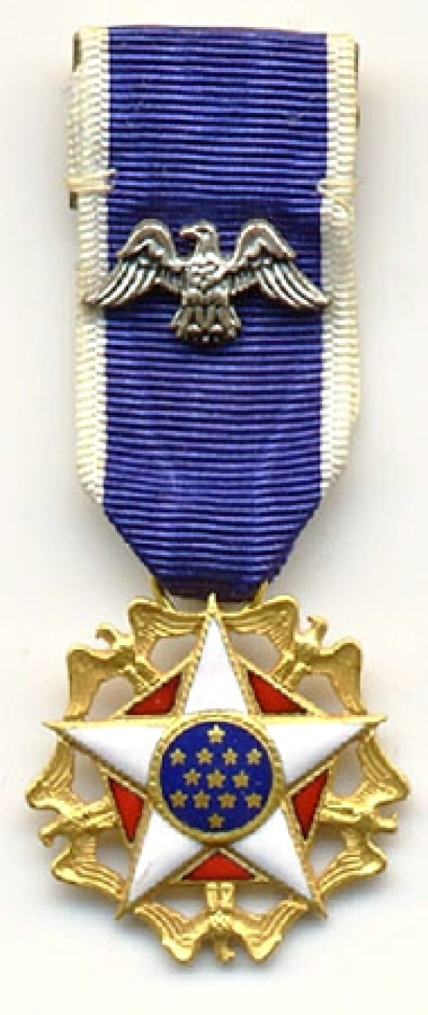 La plus haute distinction des Etats-Unis